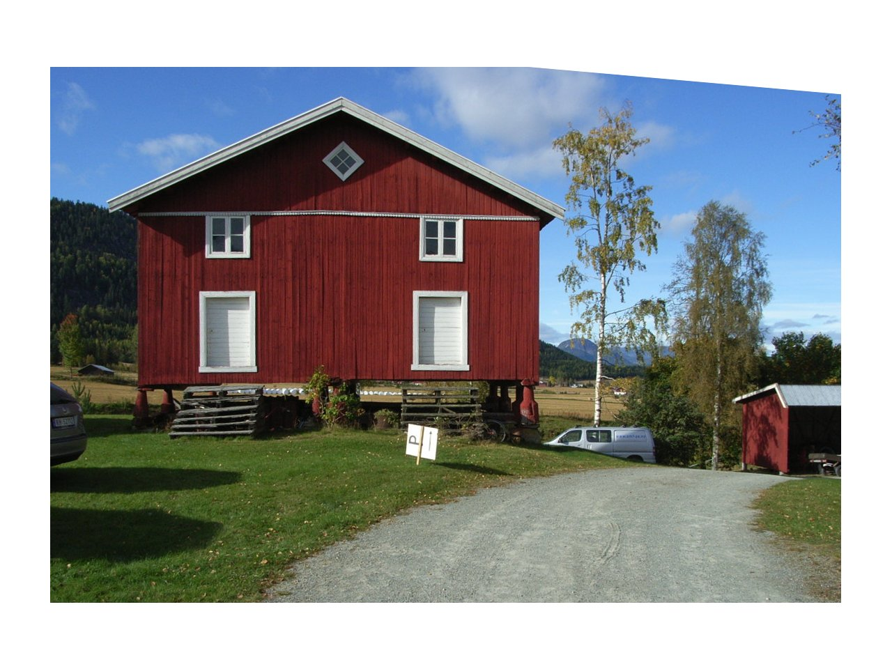 Stabbur i Sigdal i Buskerud, Noreg.